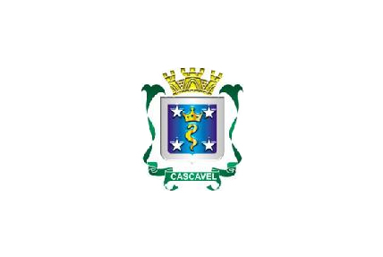 Bandeira do município de Cascavel, instituída pela Lei Municipal 5.225, de 2009, que tornou definitiva a bandeira provisória baseada no brasão, instituído pela Lei nº 243, de 9 de outubro de 1963.